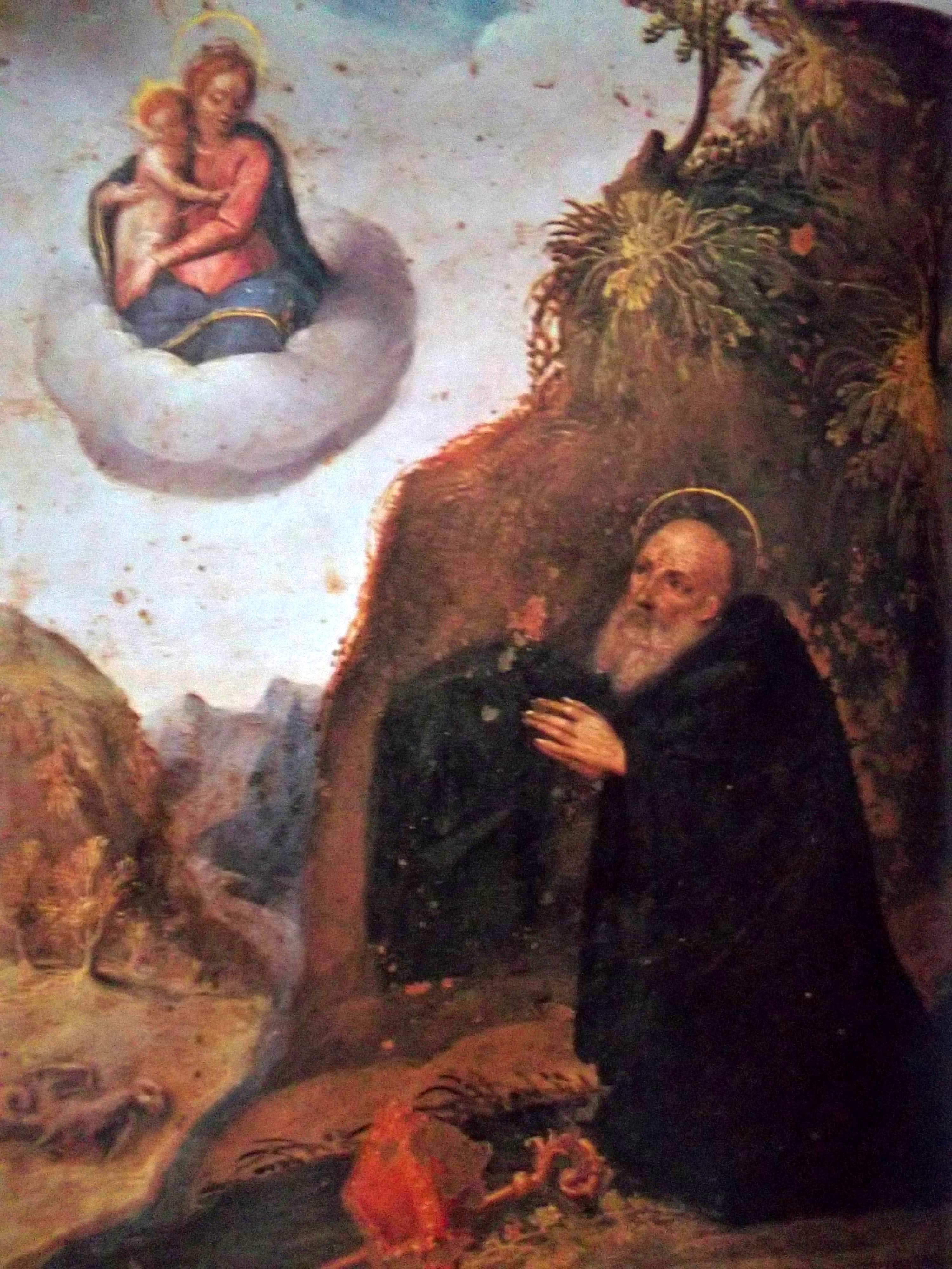 Foto-riproduzione di un dipinto di Autore anonimo La Madonna compare a San Leone da Lucca, secolo XVI. Abbazia SS. Trinità di Cava de' Tirreni (Italia)